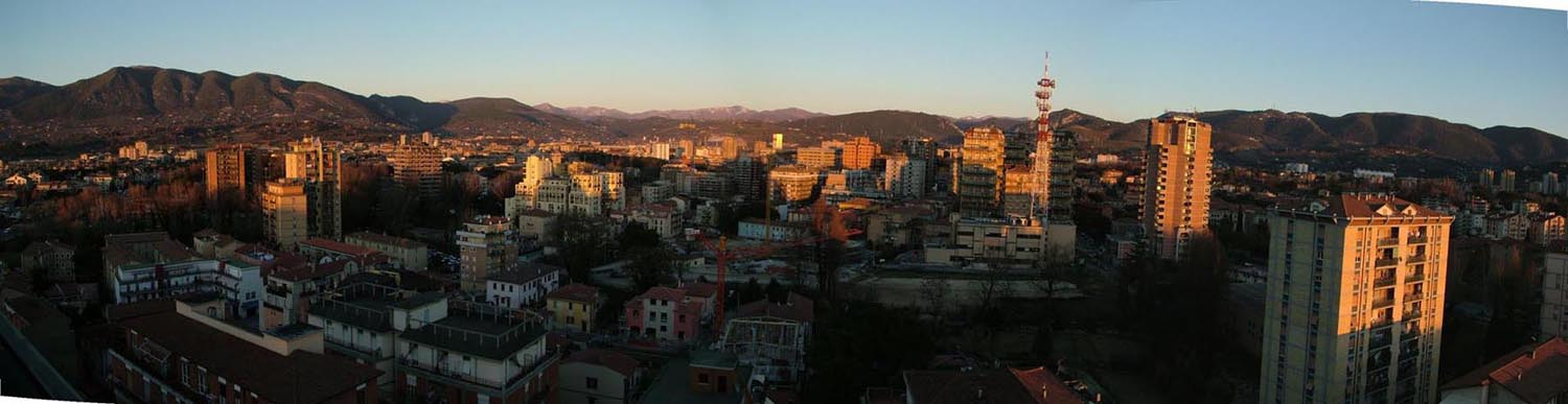 Foto panoramica della città